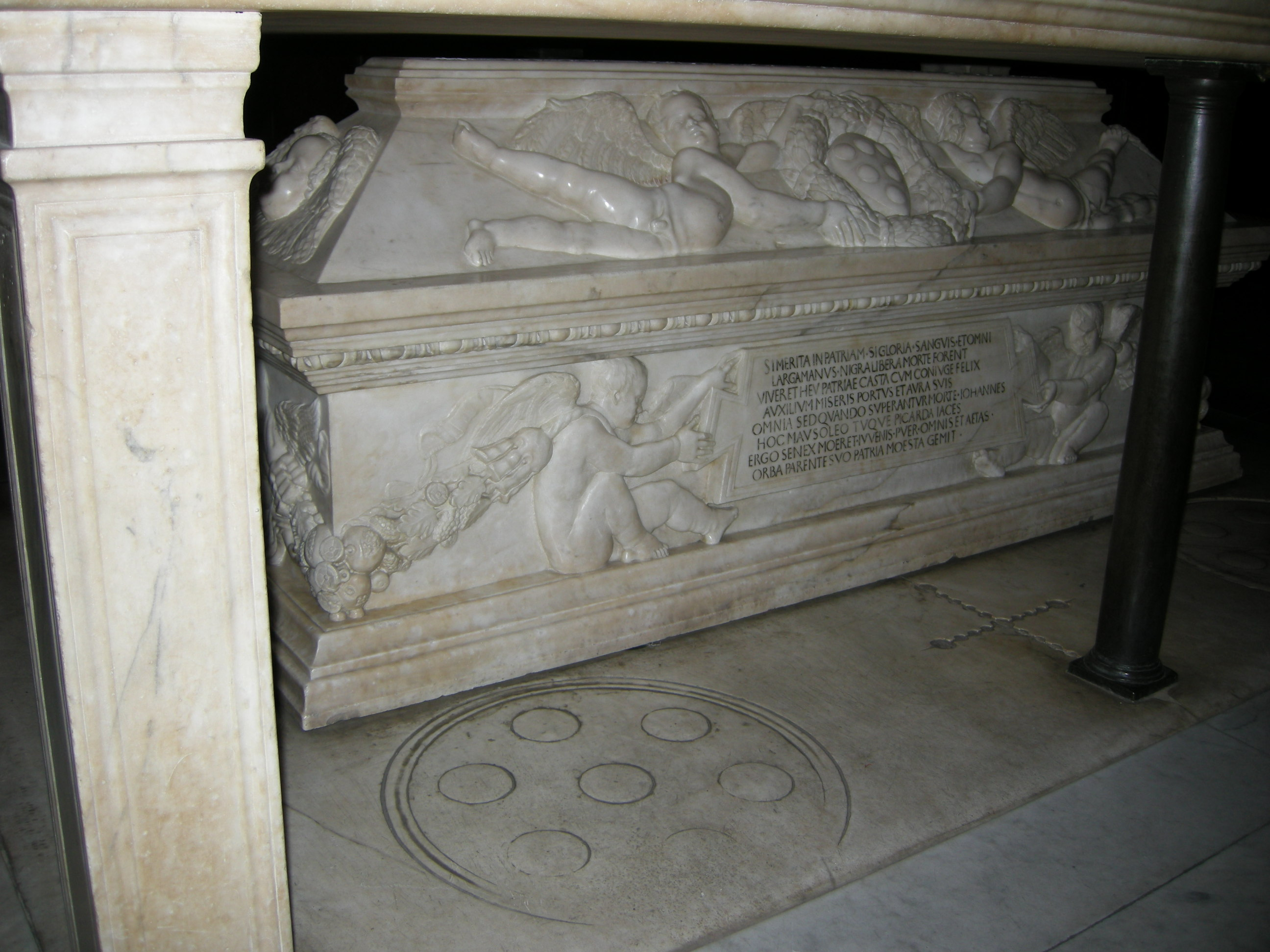 San lorenzo, sagrestia vecchia, tomba di giovanni di bicci e piccarda bueri del buggiano